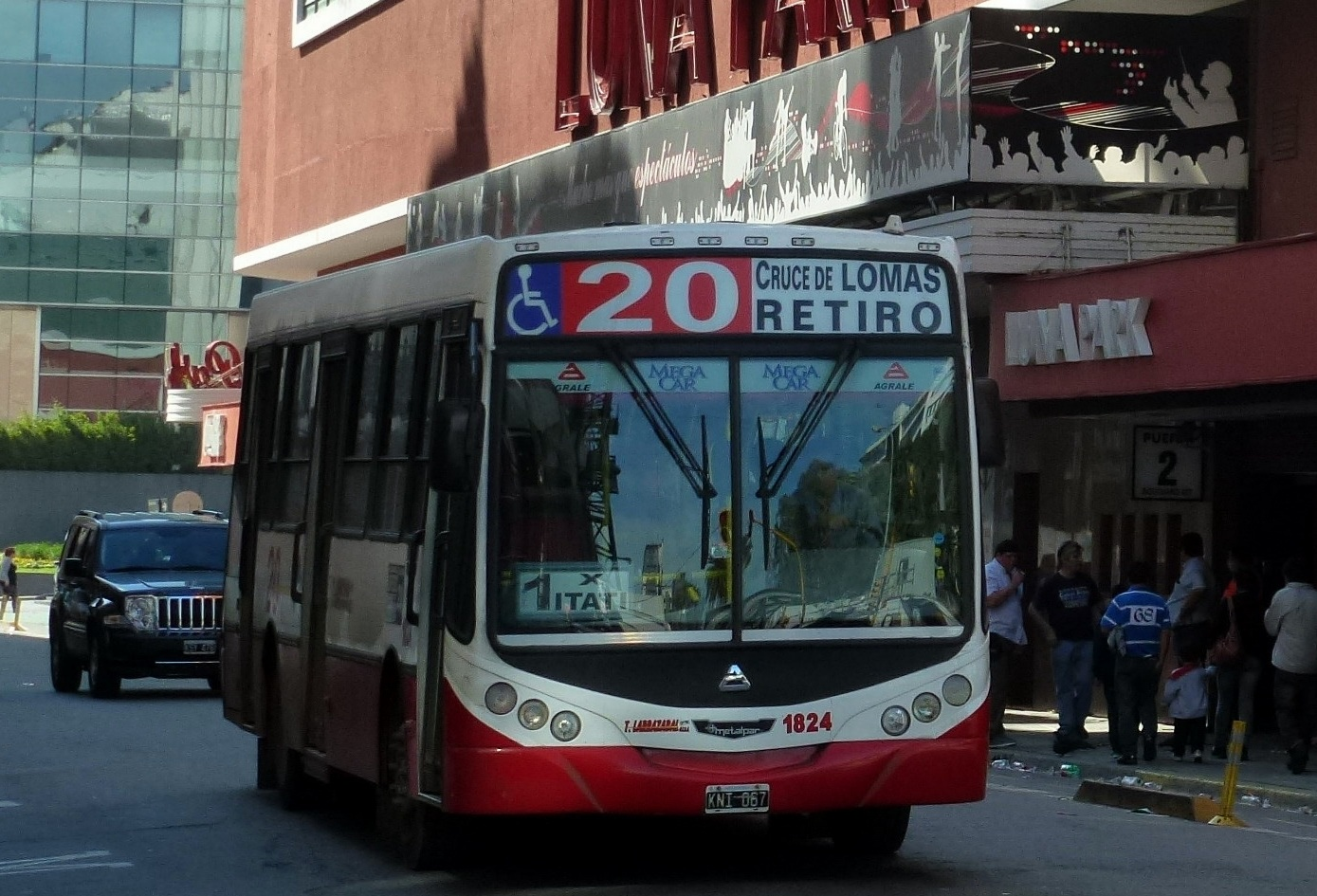 Luna Park